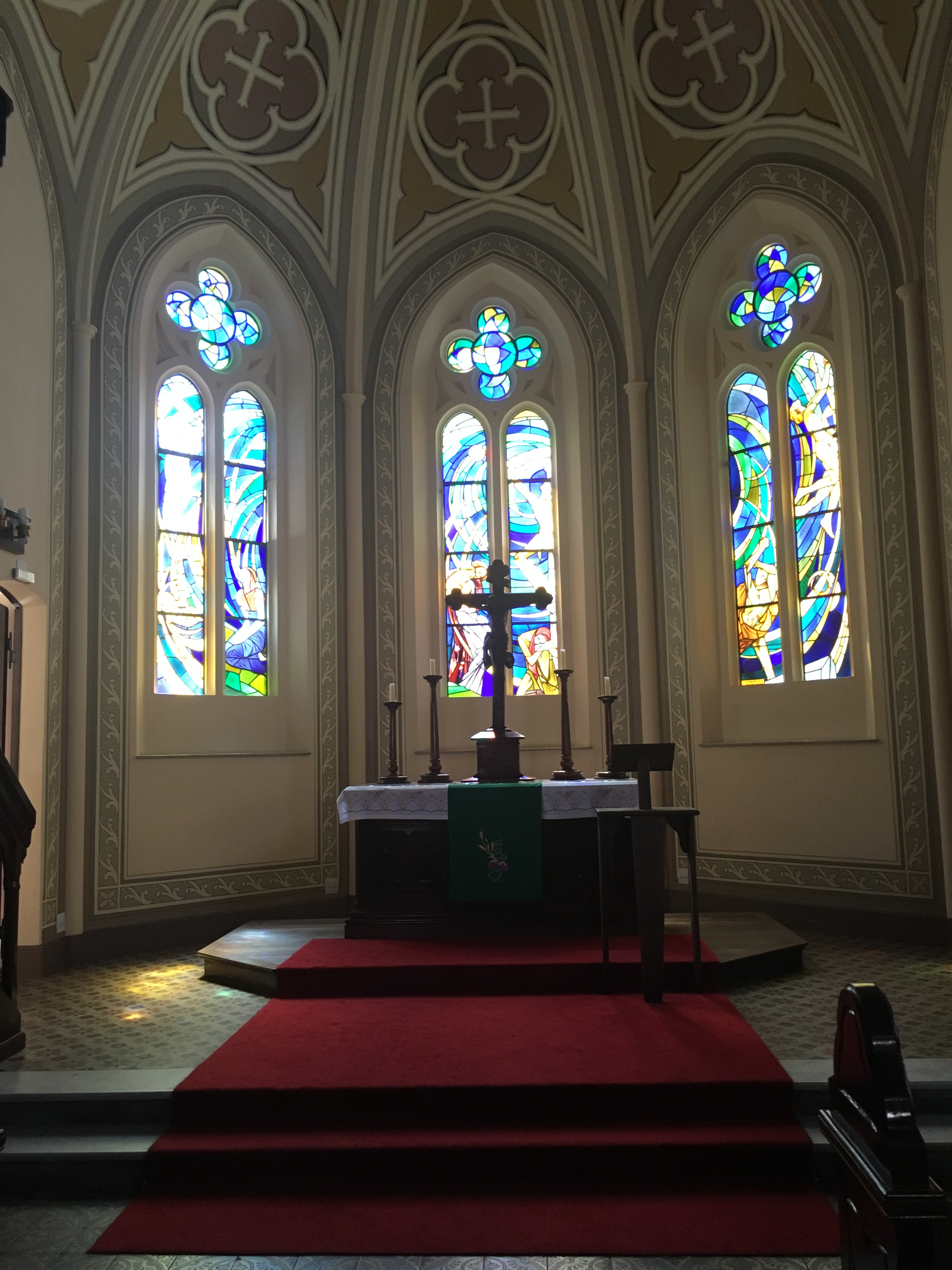 Visão frontal da altar da Igreja Luterana Martin Luther, no Largo do Paissandu (São Paulo-SP, Brasil), com detalhes dos vitrais posteriores e do tapete vermelho.